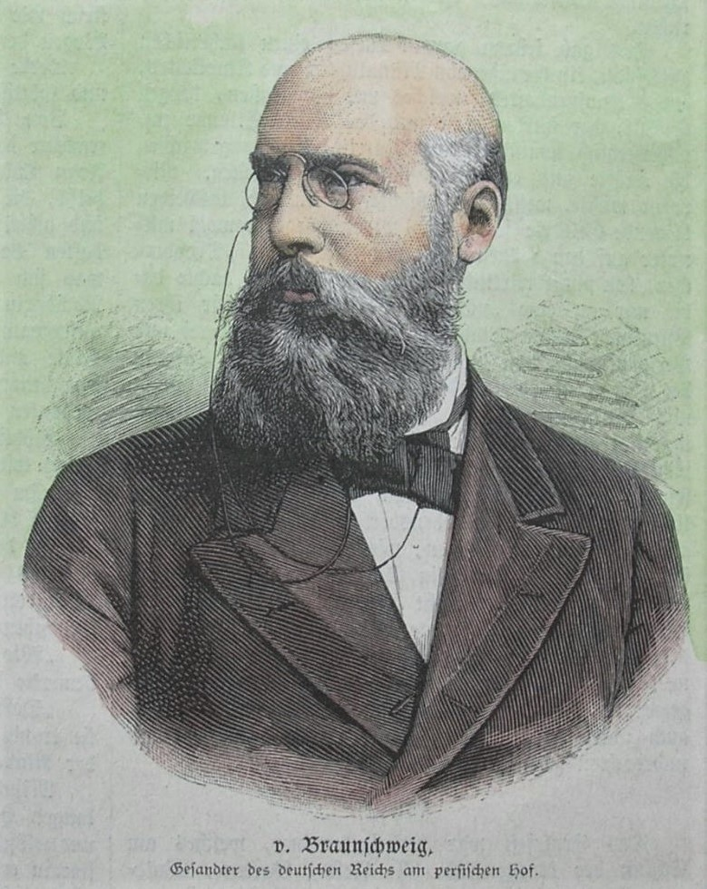 Generalkonsul Ernst von Braunschweig, Gesandter des deutschen Reiches am persischen Hof, teilkolorierter Holzstich, ca. 11 x 9,5 cm